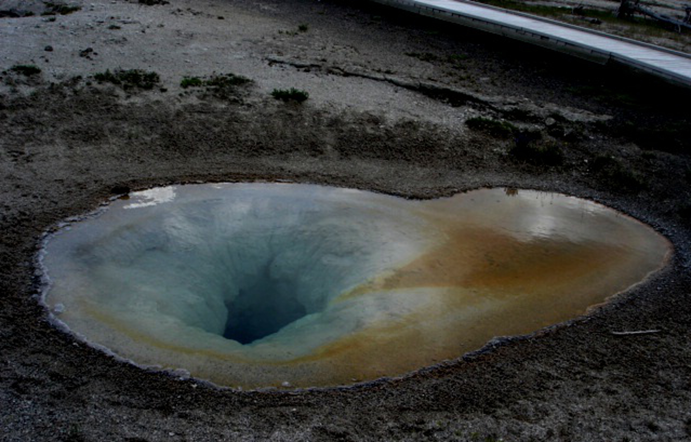 Corresponde a uno de los cráteres de mayor profundidad ubicado en el Parque de Yellowstone, Wyoming. En el mismo se ha formado un lago rodeado de cyanobacterias Biscuit que se pueden observar por su coloración rojiza.